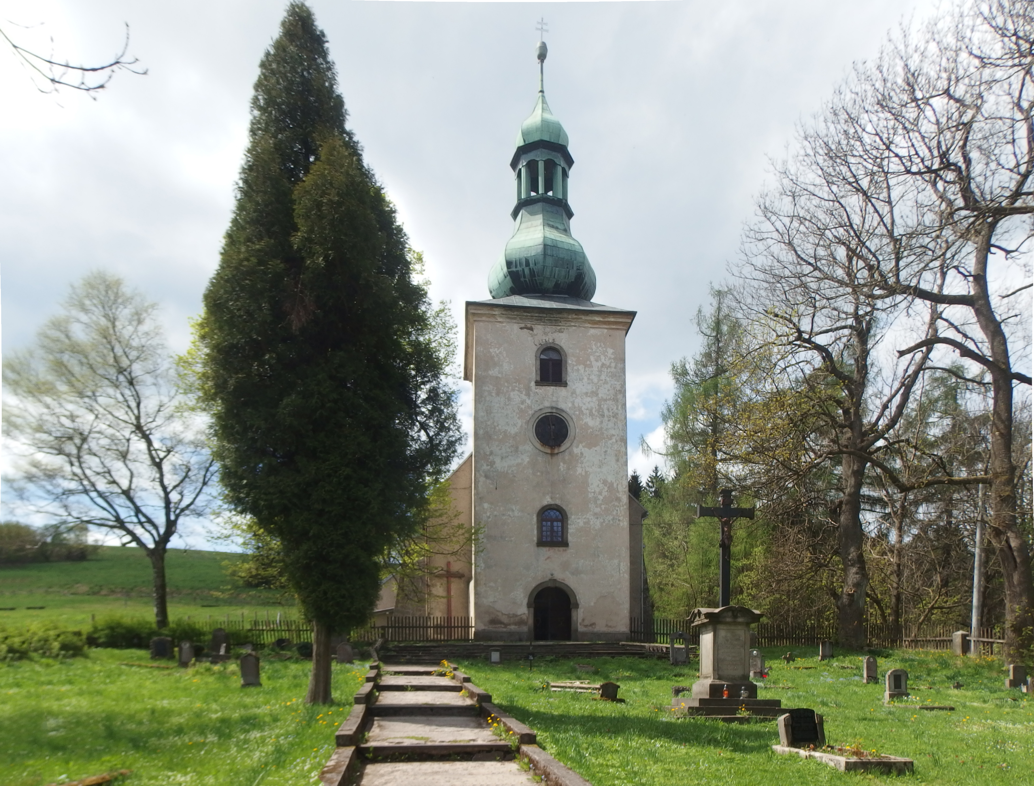 Pasterka, Polsko, kostel svatého Jana Křtitele.